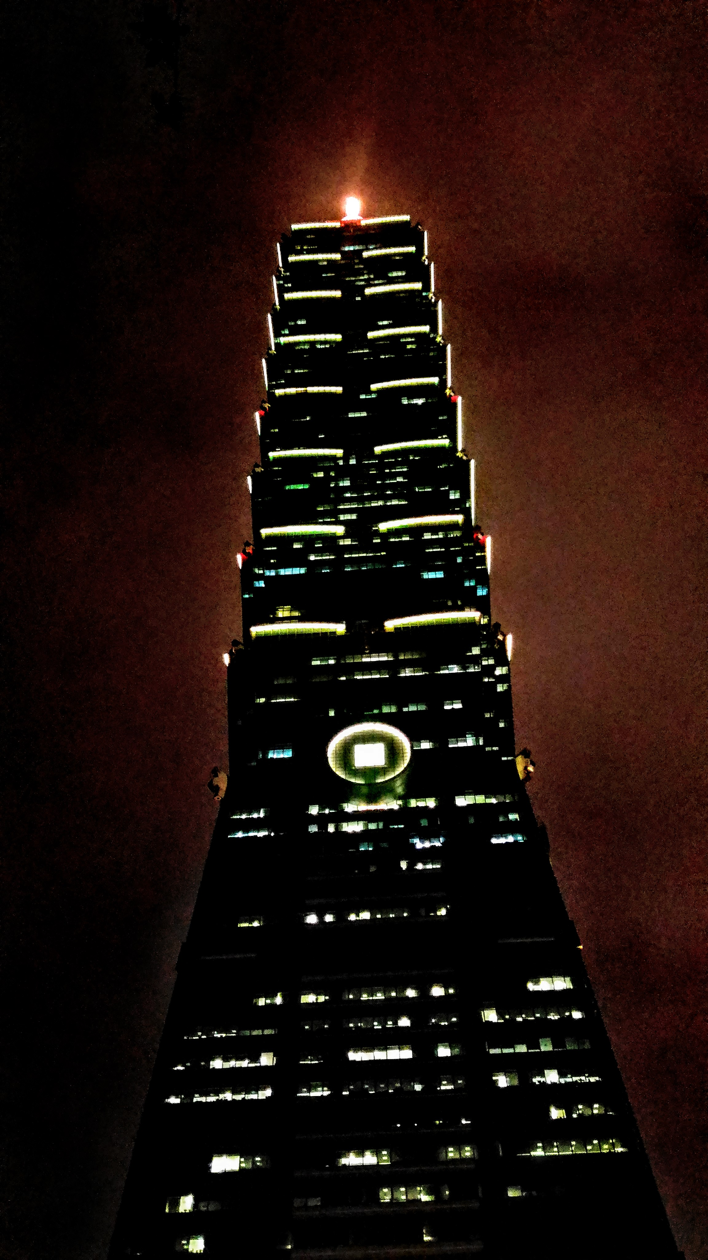 台北101外觀夜景燈光-2016年12月拍攝(星期三)